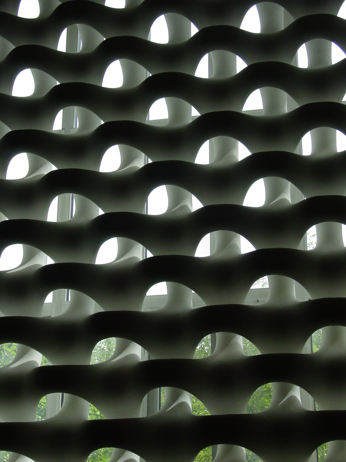 Pfarrkirche Liesing (Wien 23). Durchbrochene Wand von Erwin Hauer, Design 3